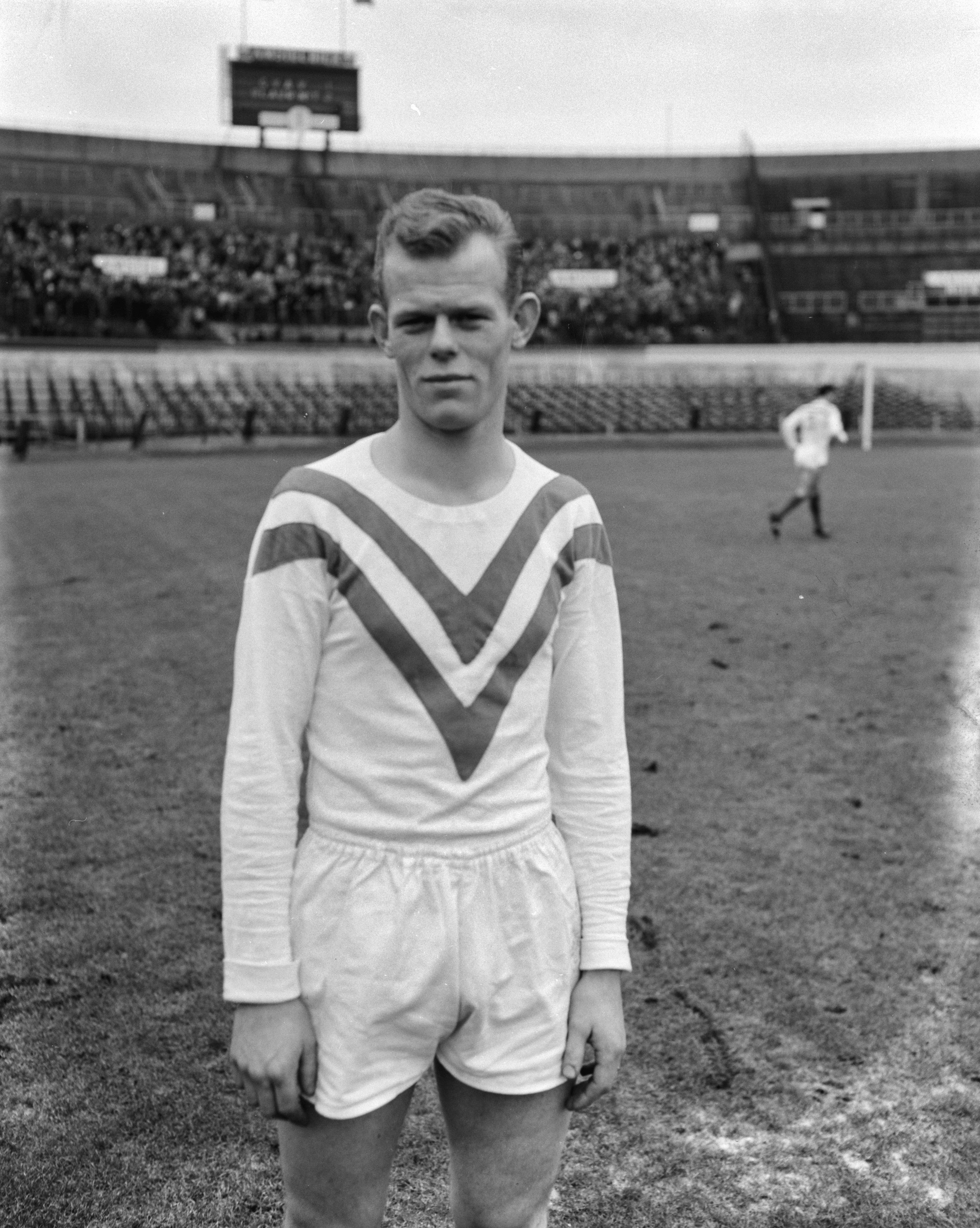 Martin Koeman, Blauw-Wit tegen GVAV.